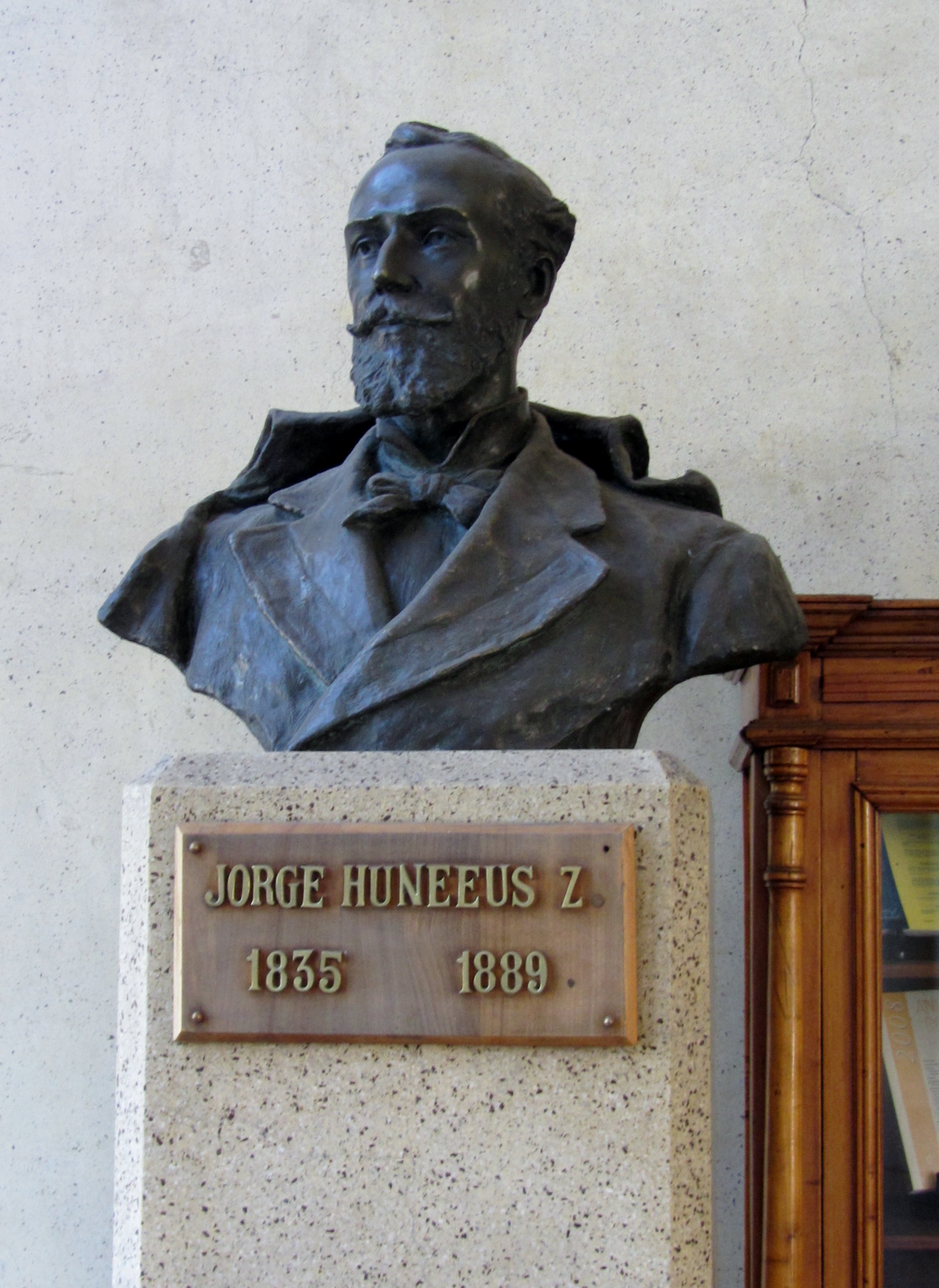 Busto del rector de la Universidad de Chile Jorge Huneeus Zegers en la Escuela de Derecho.